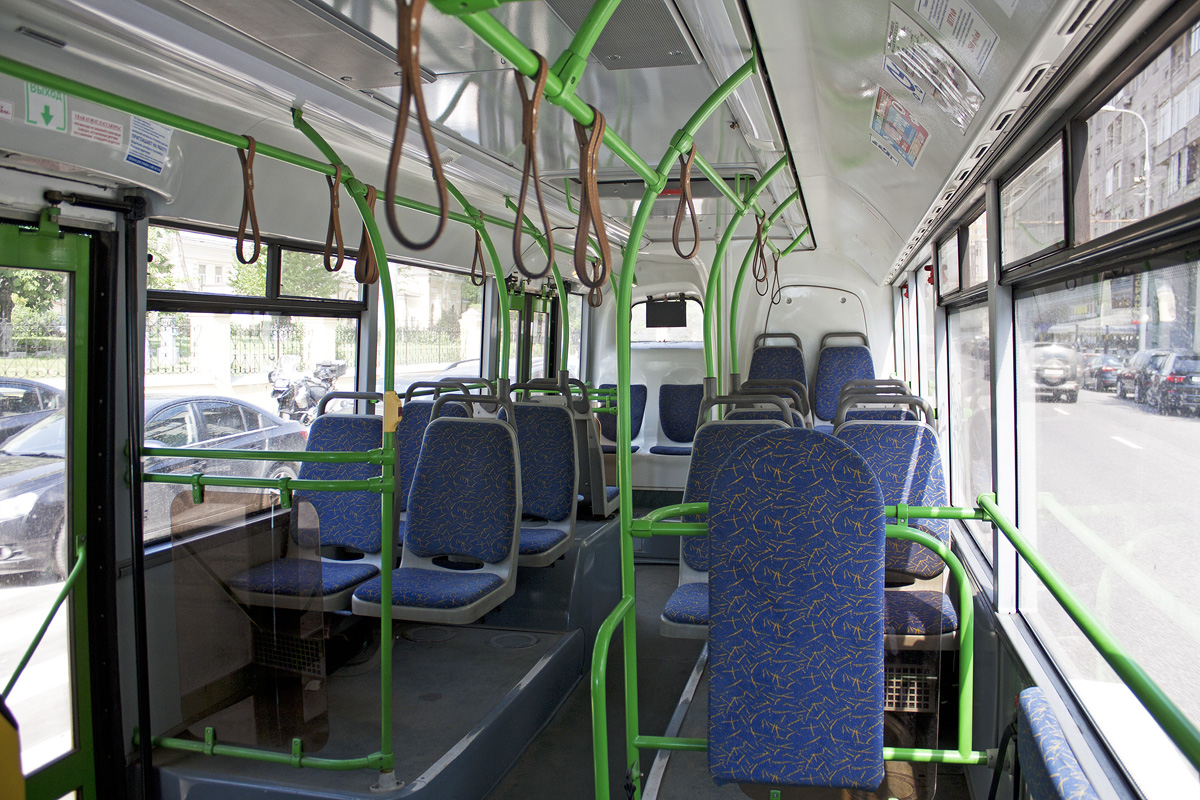 Салон автобуса ЛиАЗ-5292.21 №08190